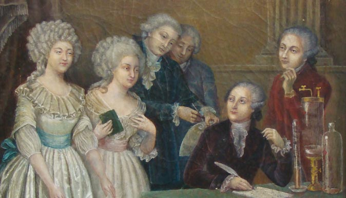 inspired by the Portrait of Antoine-Laurent Lavoisier and his wife by Jacques-Louis David (1788), Marie-Anne Paulze (Mme. Lavoisier, left), Claudine Picardet (Mme. Guyton de Morveau, with book), Claude Louis Berthollet, Antoine-François Fourcroy, Antoine Lavoisier (seated) and Louis-Bernard Guyton de Morveau (right).